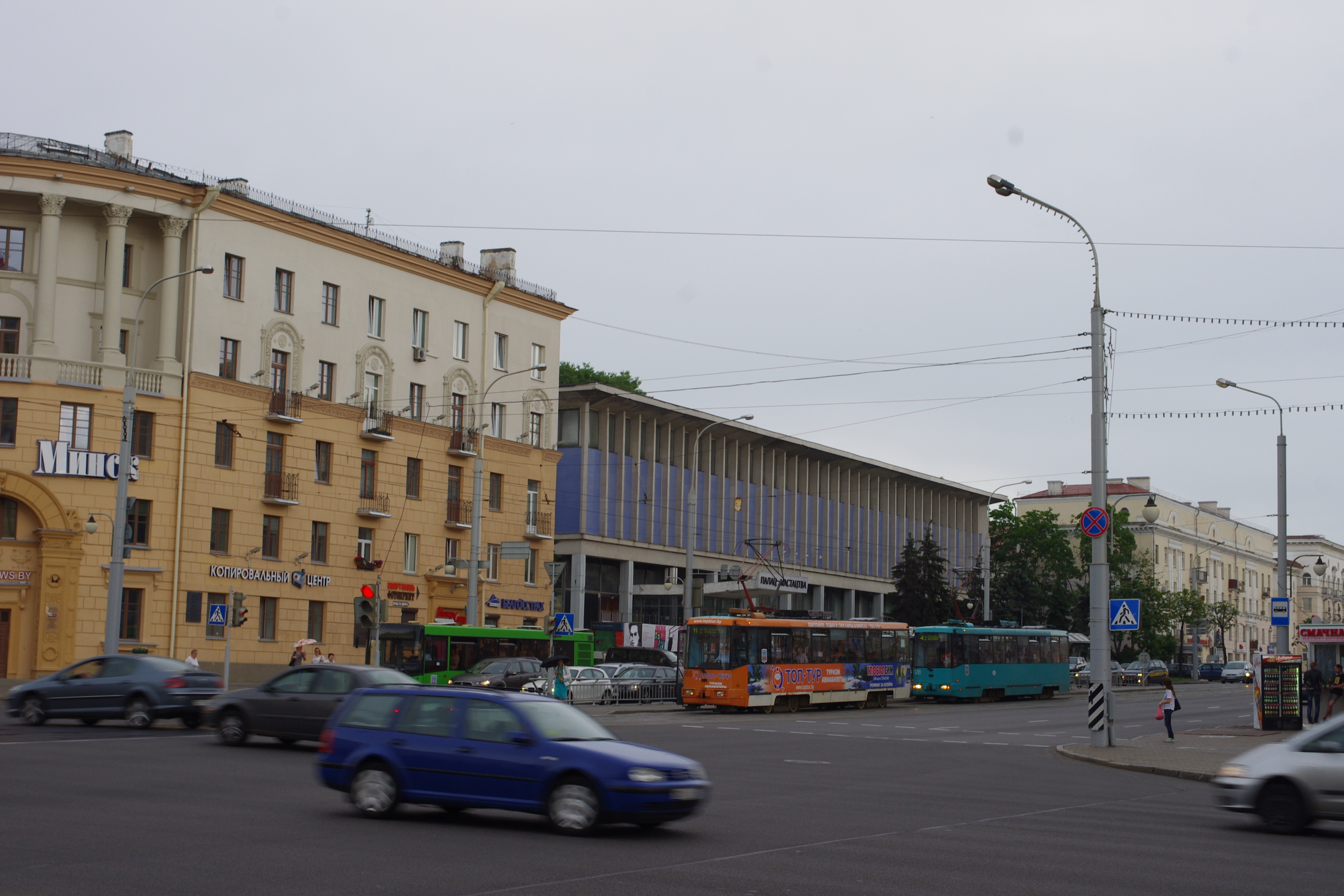 Minsk, Belarus